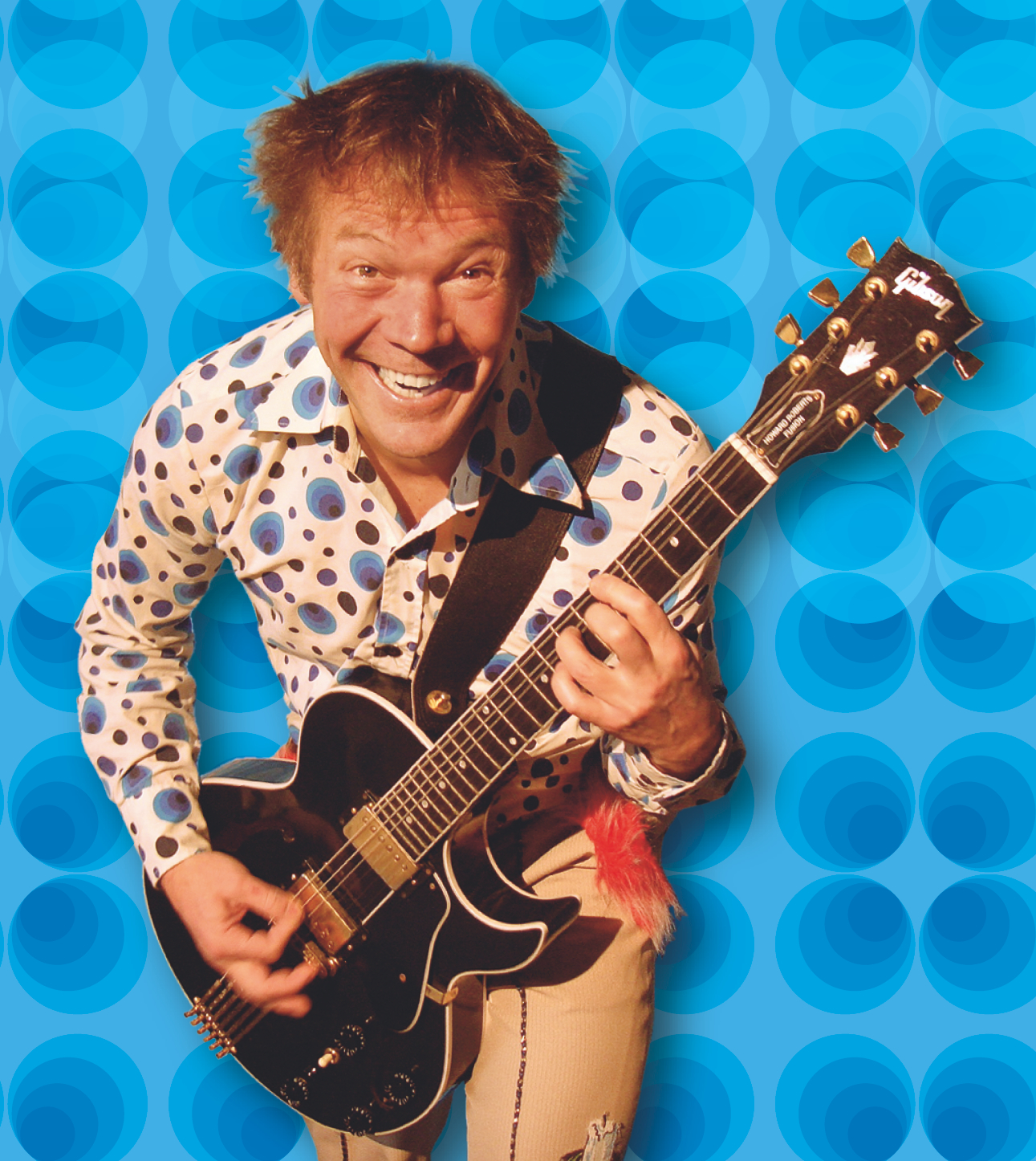 Kinderliedermacher Geraldino spielt bei einem Auftritt Gitarre - der Hintergrund wurde entfernt und durch einen anderen ersetzt